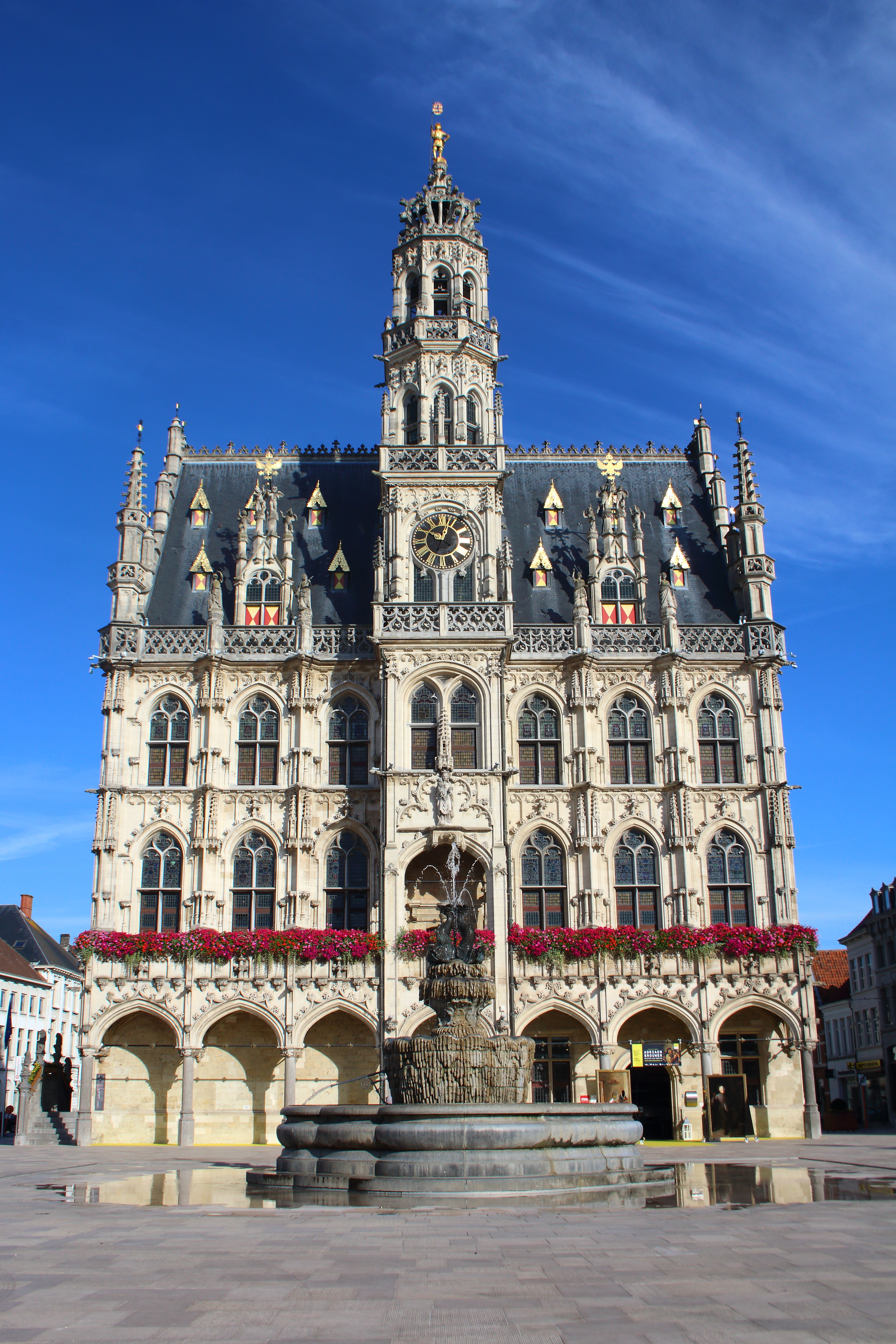 stadhuis, Oudenaarde, Vlaanderen, België